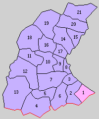 富山県氷見郡の町村。